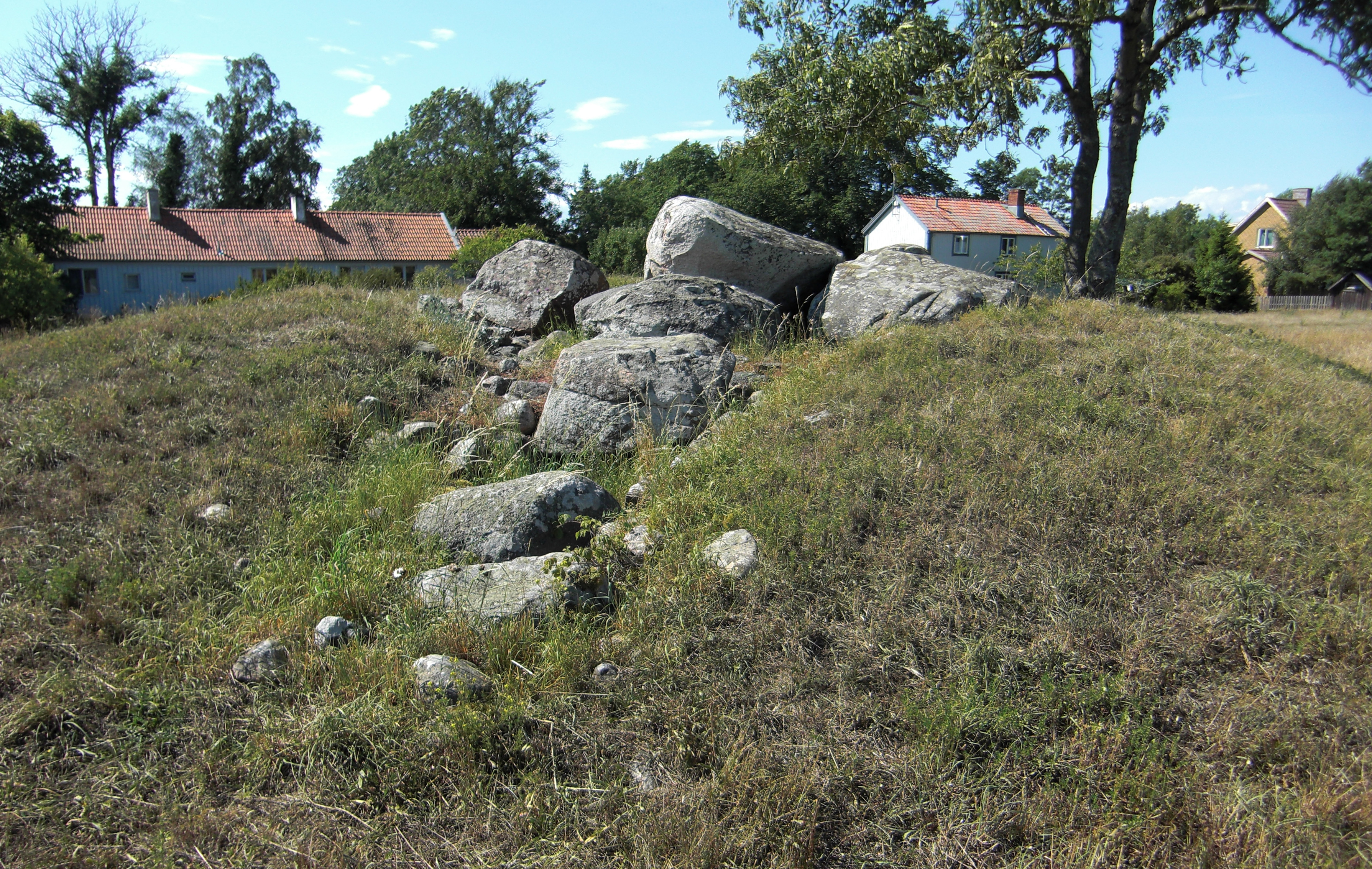 Mysinge gånggrift (Raä-nr Resmo 81:1) i Resmo socken, Mörbylånga kommun, Öland, Kalmar län, Sverige.